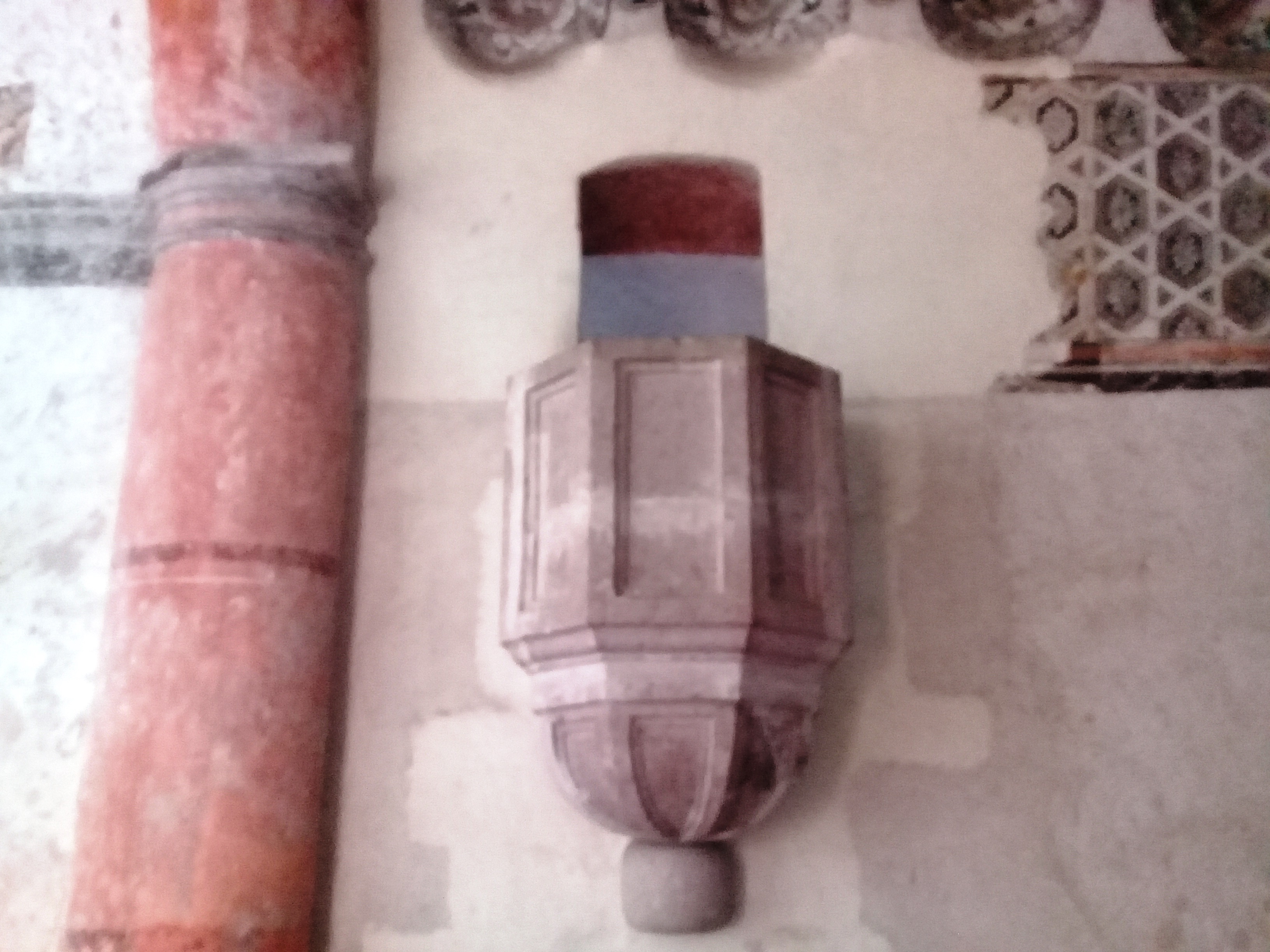 Templo y exconvento de San Nicolás de Tolentino (Actopan).